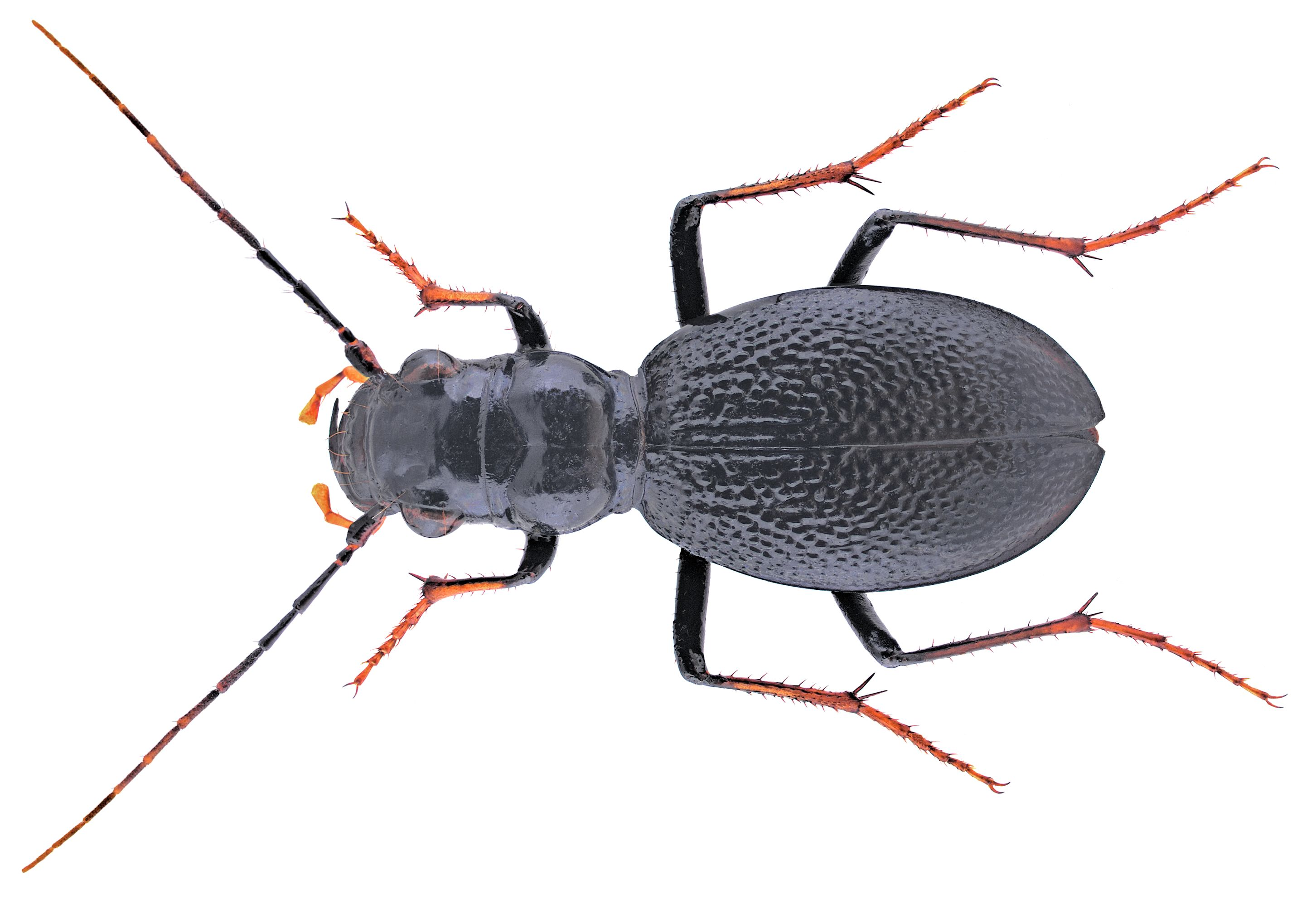 Familie: Carabidae Grösse: 24 mm Fundort: Kenia, Tsavo National Park leg. U.Schmidt, 1991; det. J.Gebert, 2007 Foto: U.Schmidt, 2007